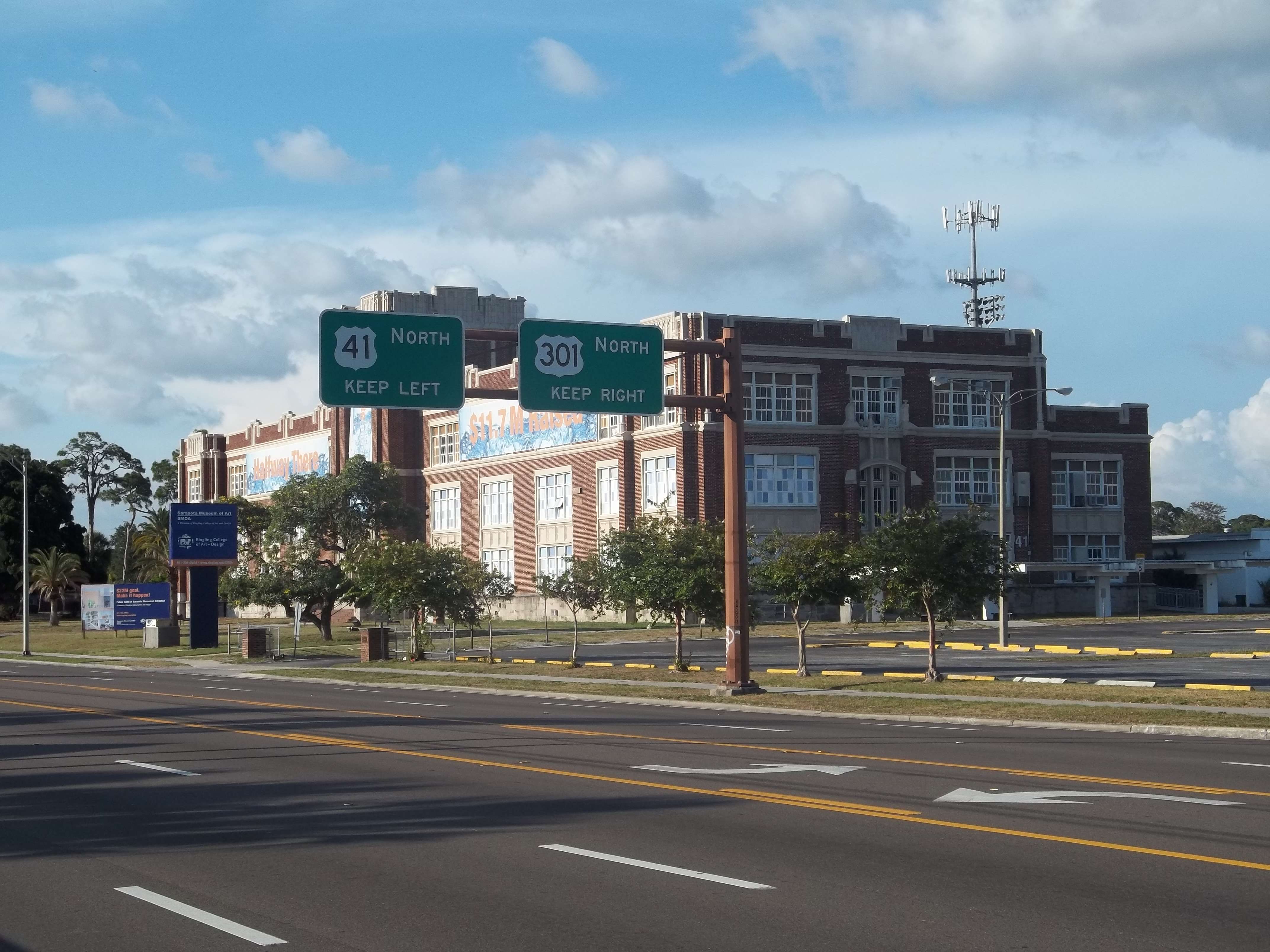 Sarasota, Florida: U.S. Route 41/U.S. Route 301